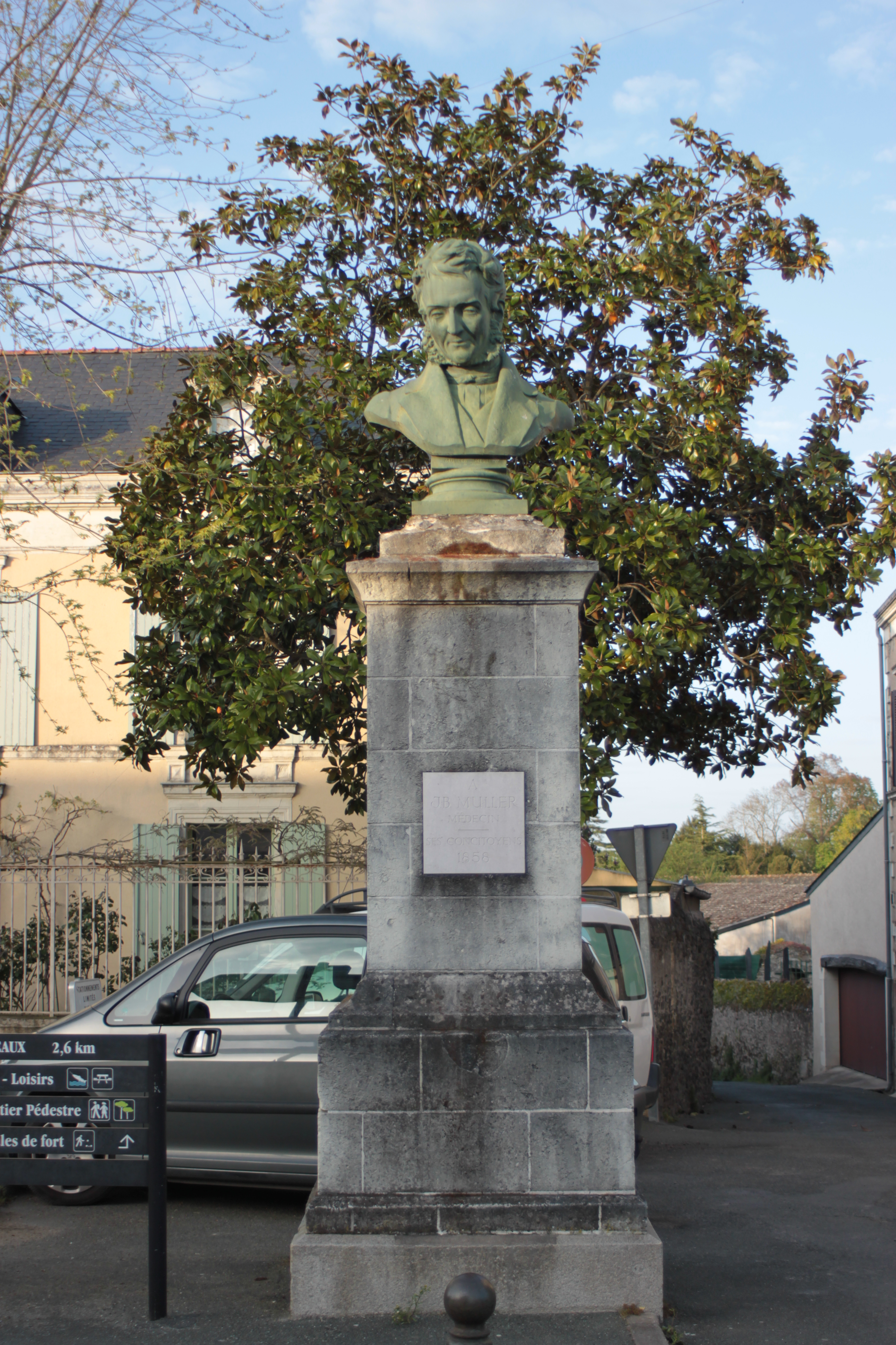 Buste de J.B. Müller (1858), Fr-49-Denée.